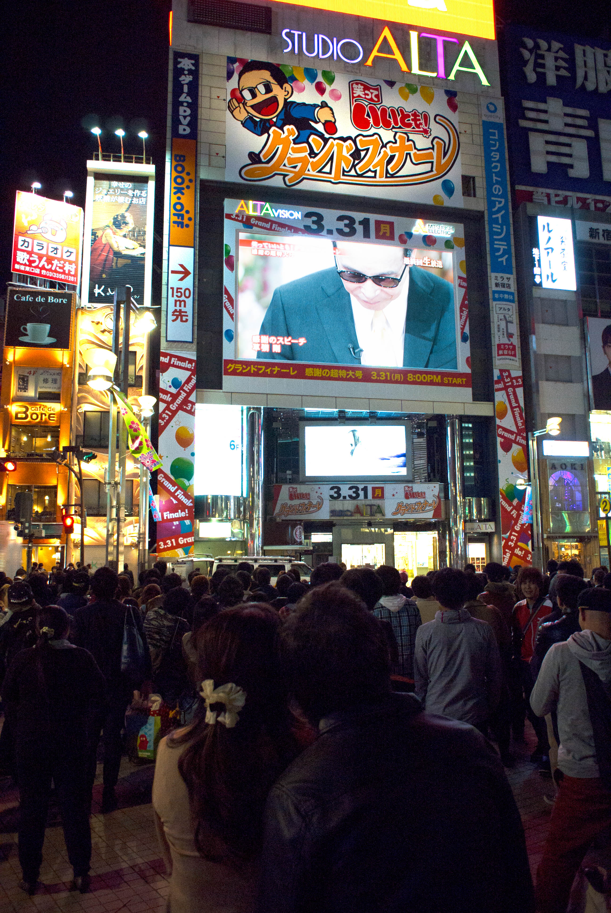 Waratte Iitomo! (森田一義アワー 笑っていいとも!) アルタビジョンをリニューアル ([1] [2])